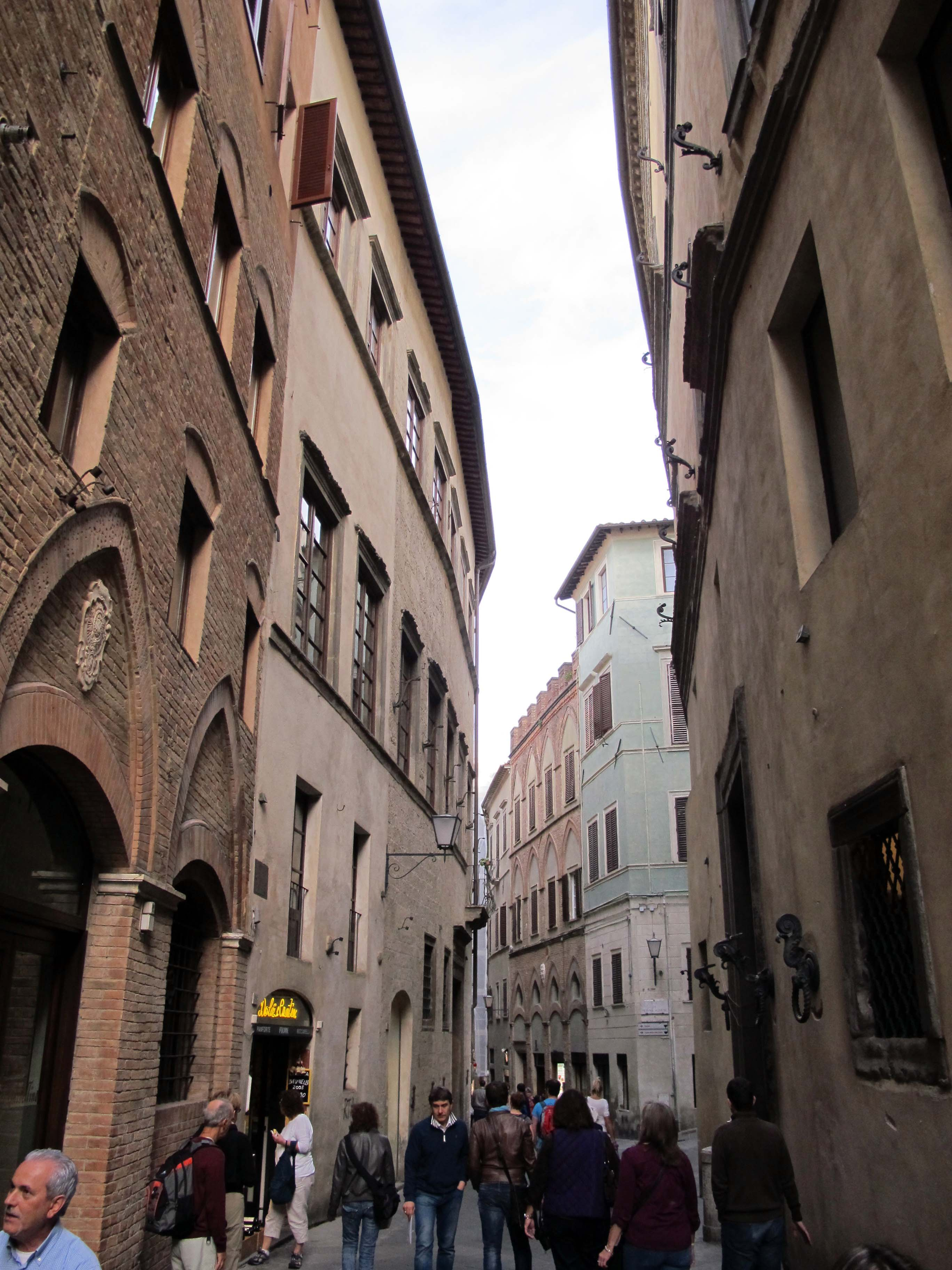 Via dei Pellegrini e dintorni, Siena